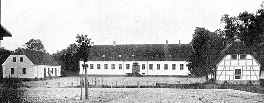 Bøgebjerg er dannet i 1748 af Peder Pedersen Juel og er nu en avlsgård under Hverringe Gods. Gården ligger i Viby Sogn, Bjerge Herred, Kerteminde Kommune. Hovedbygningen er opført i 1845.